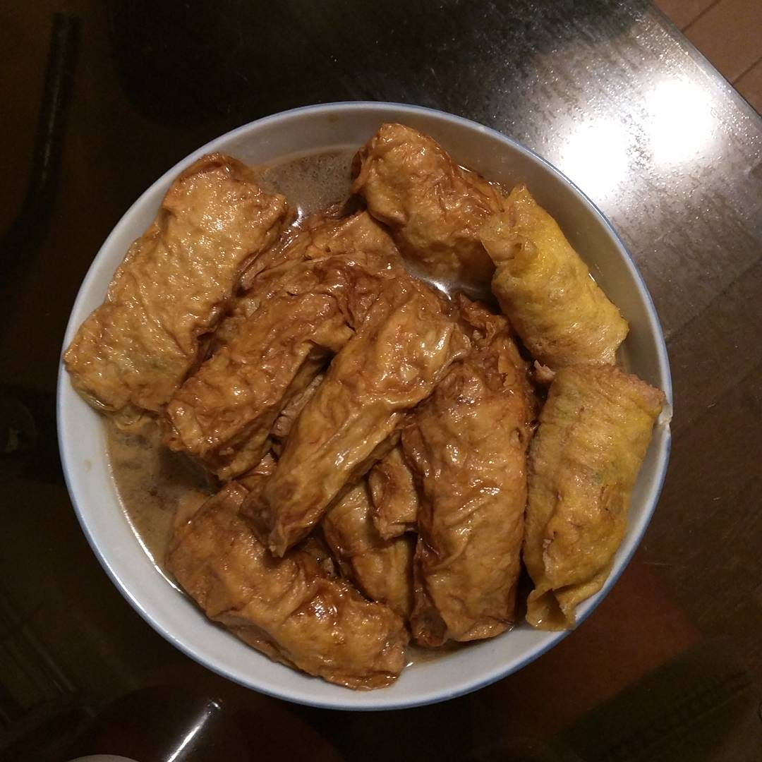 Stuffed bai ye